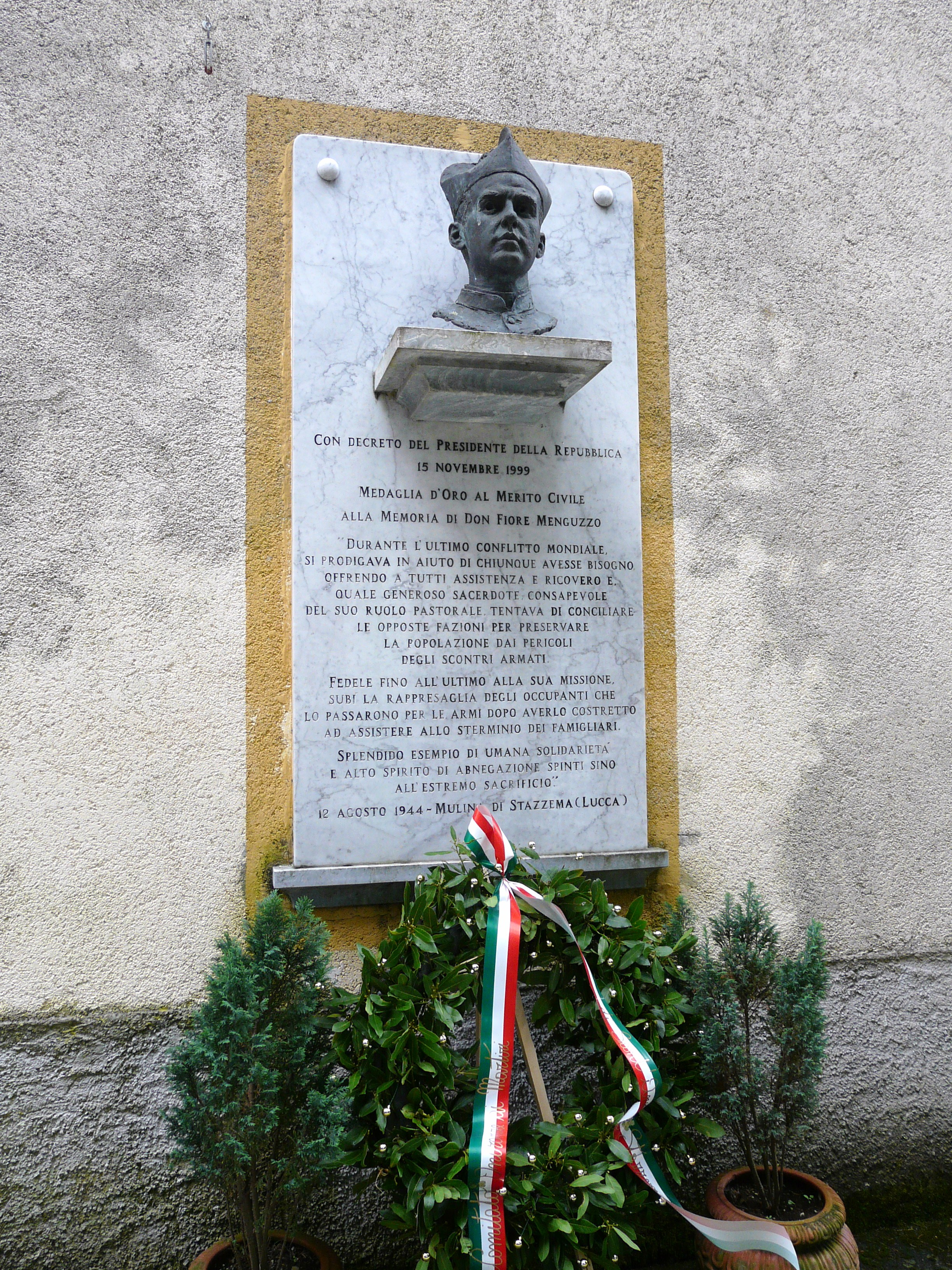 Lapide in memoria di don Fiore Menguzzo a Mulina, Stazzema, Toscana, Italia